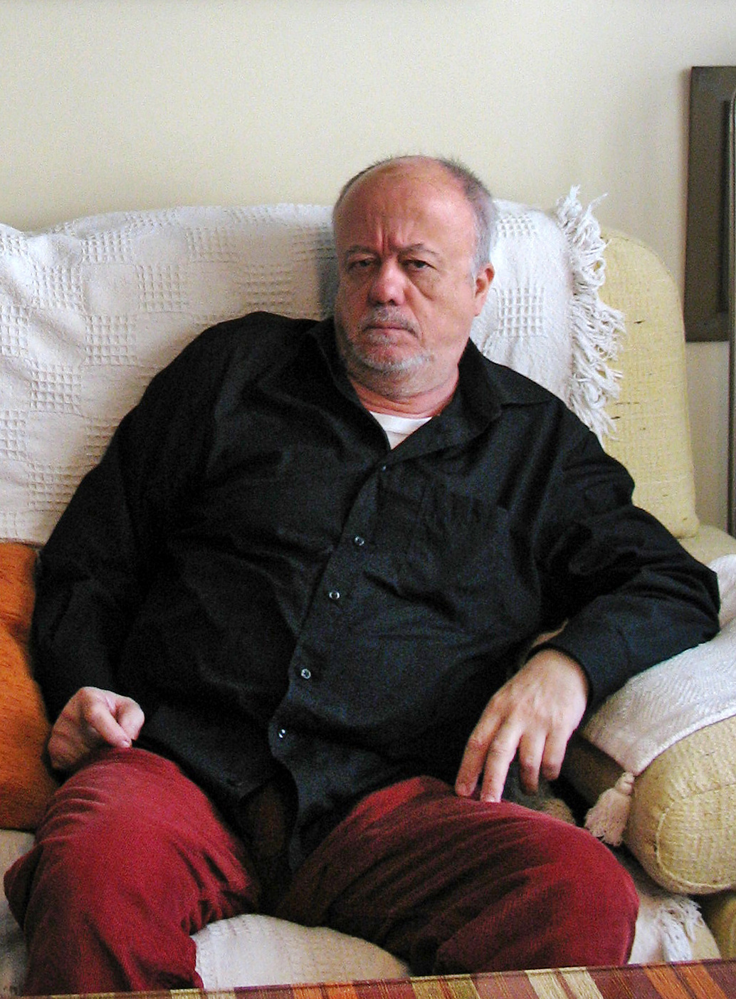 El pintor cordobés Rafael Navarro (1946-2015), ante una de sus obras, en marzo de 2009